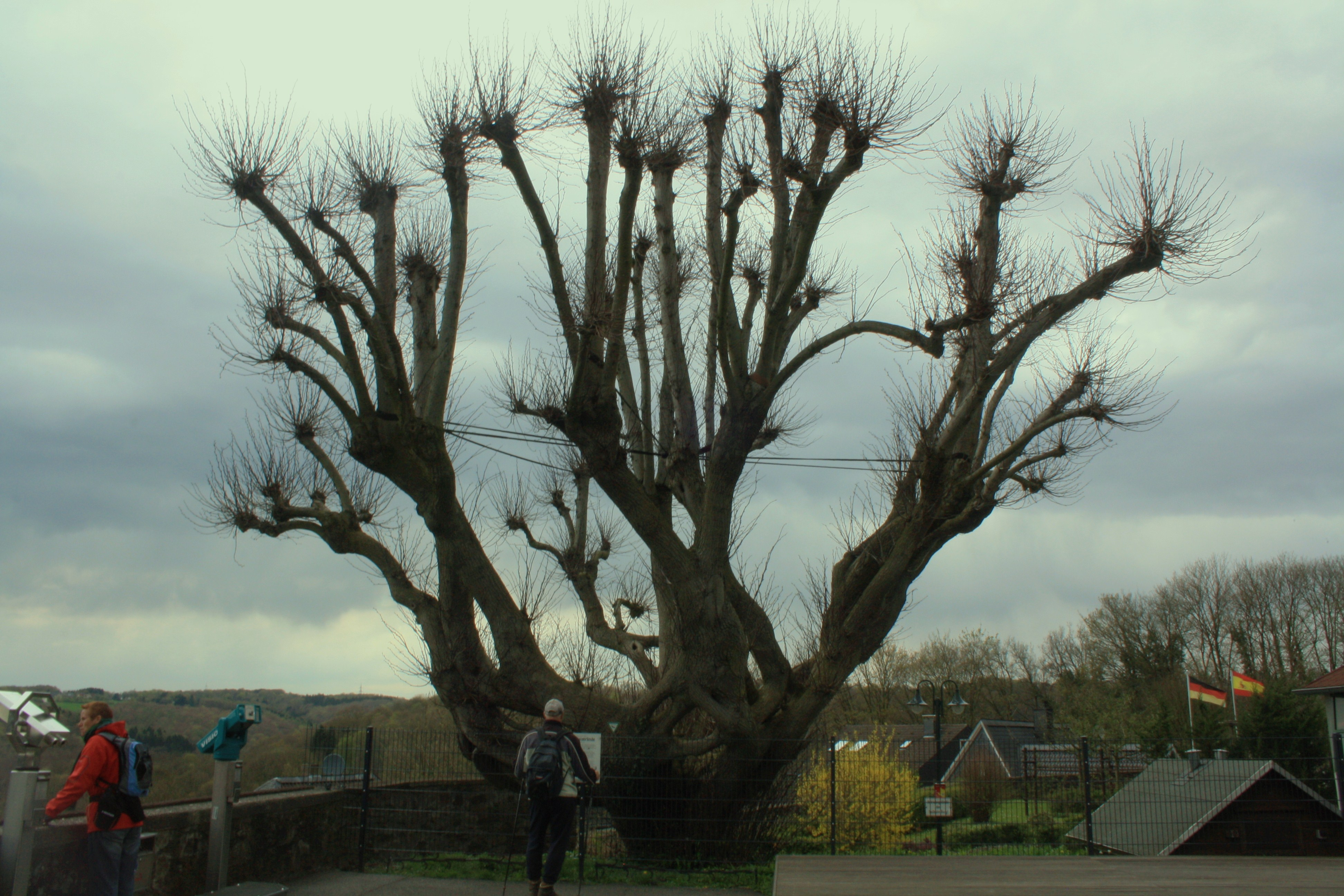 Kaiserlinde bei Schloss Burg